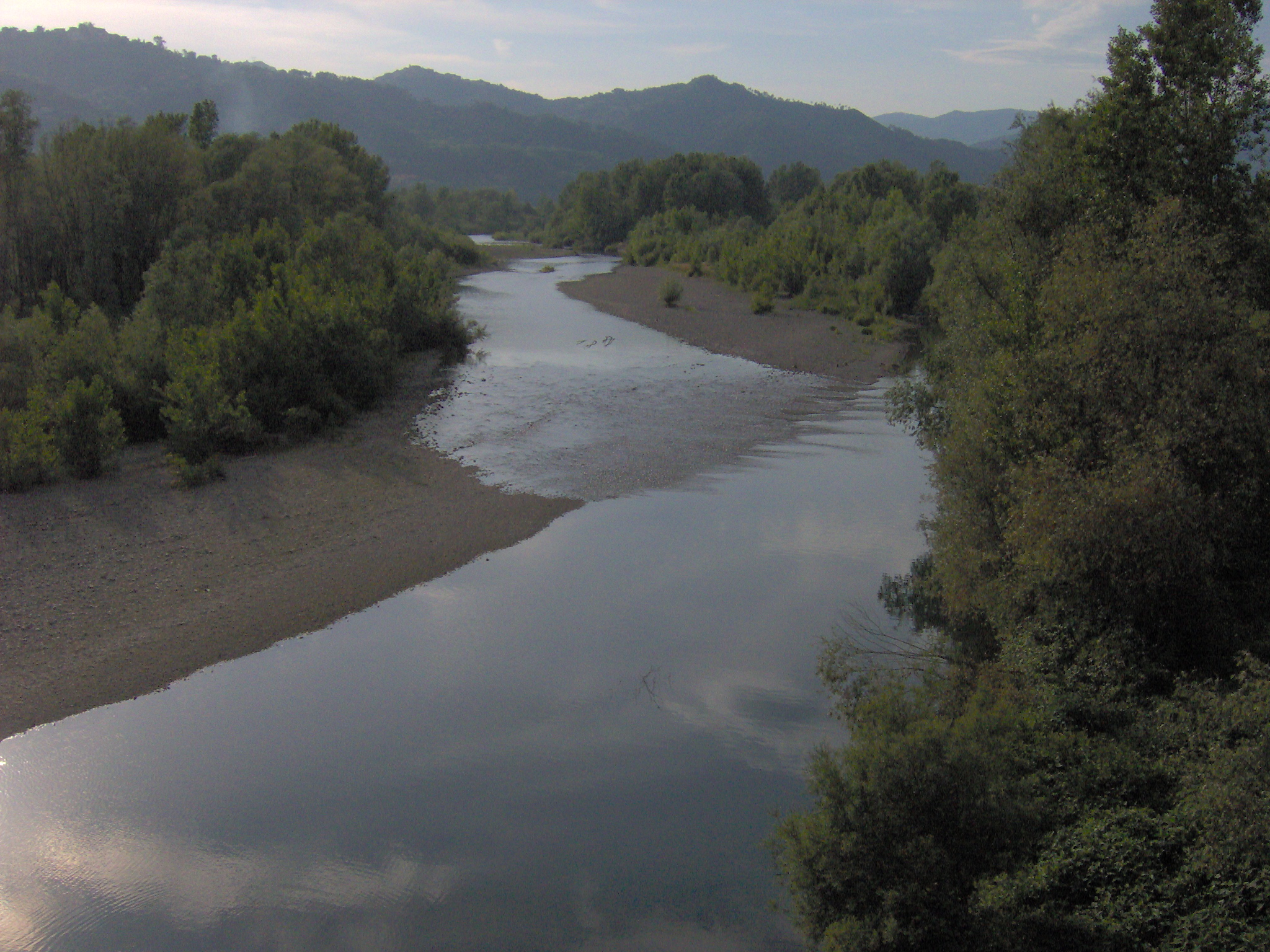 Fiume Vara fotografato dal ponte di Ceparana